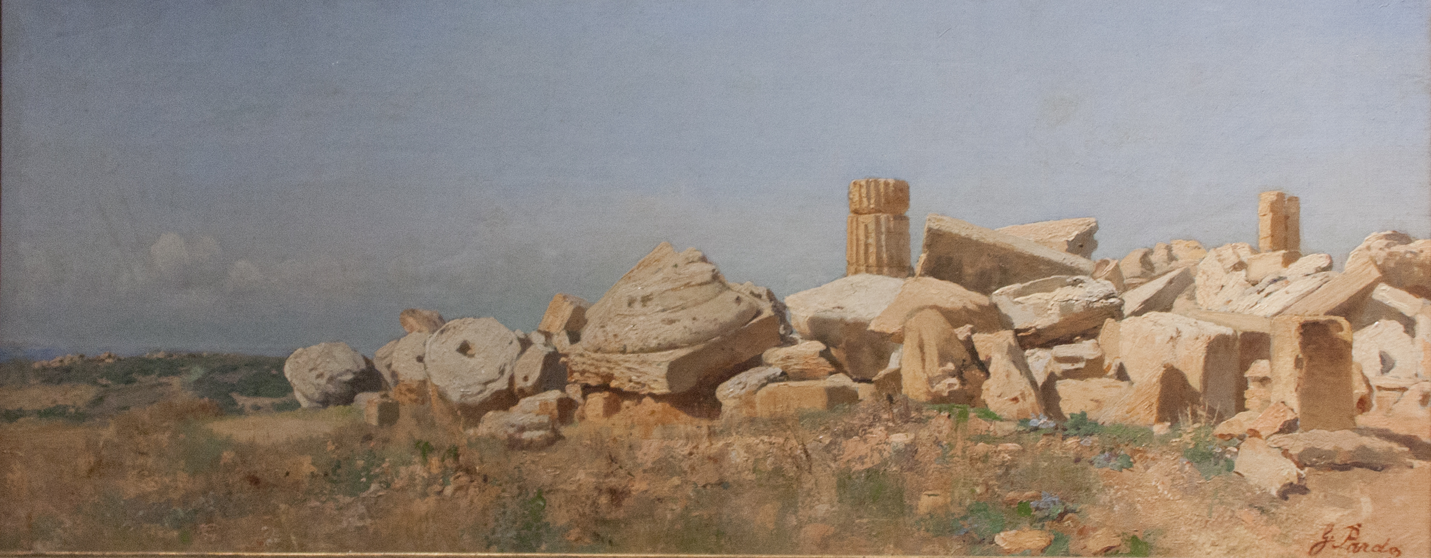 L'Heraion di Selinunte - Gennaro Pardo olio su tela 1020-1921 ca Acquisto del Ministero dell'Educazione Nazionale 1937